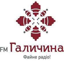 логотип